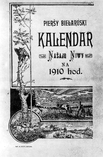 Вокладка "Першага беларускага календара на 1910 г. Выданне "Нашай Нівы". Вільня, 1909. Друкарскі адбітак.